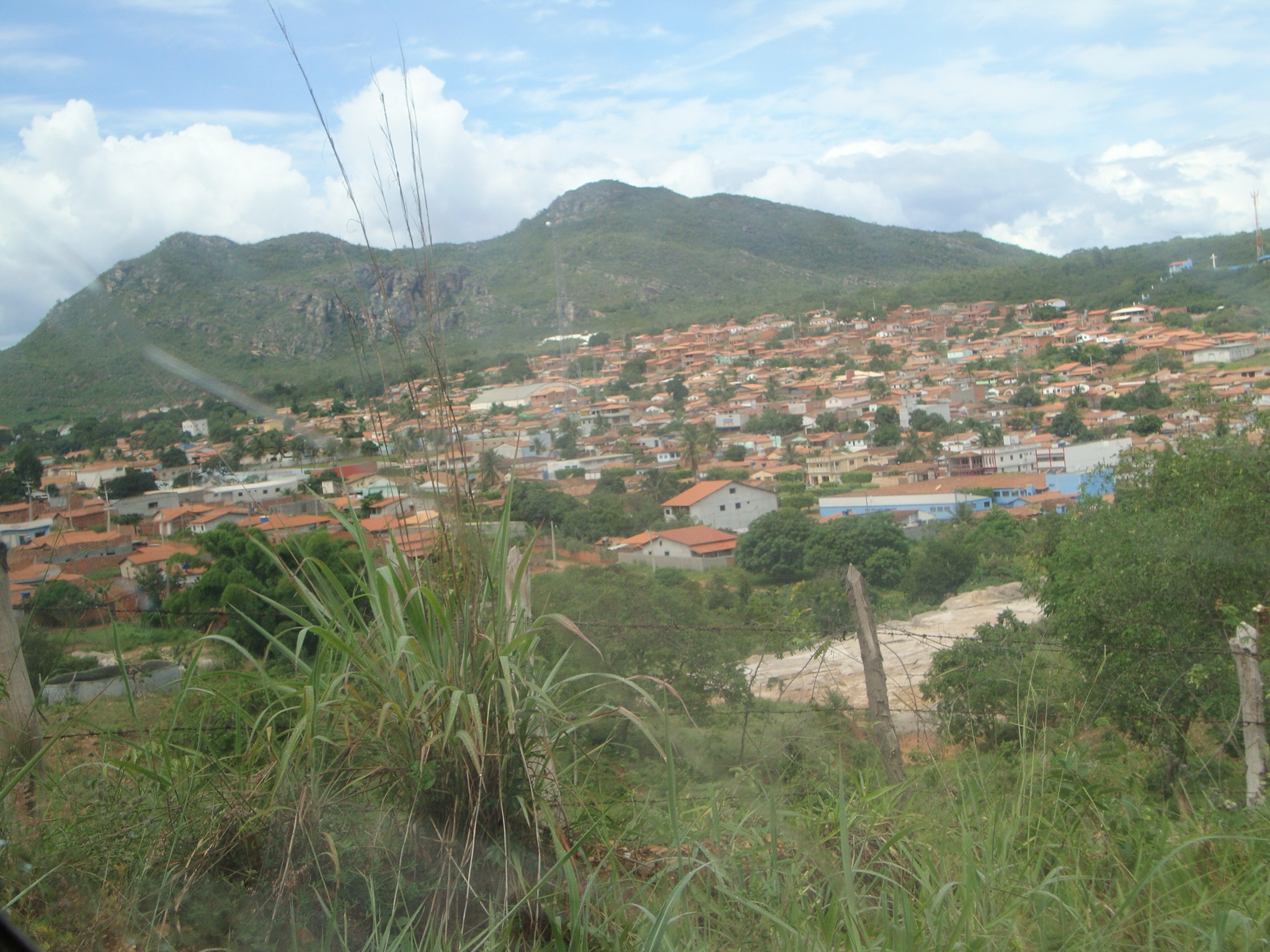 Mostra quase todo o município